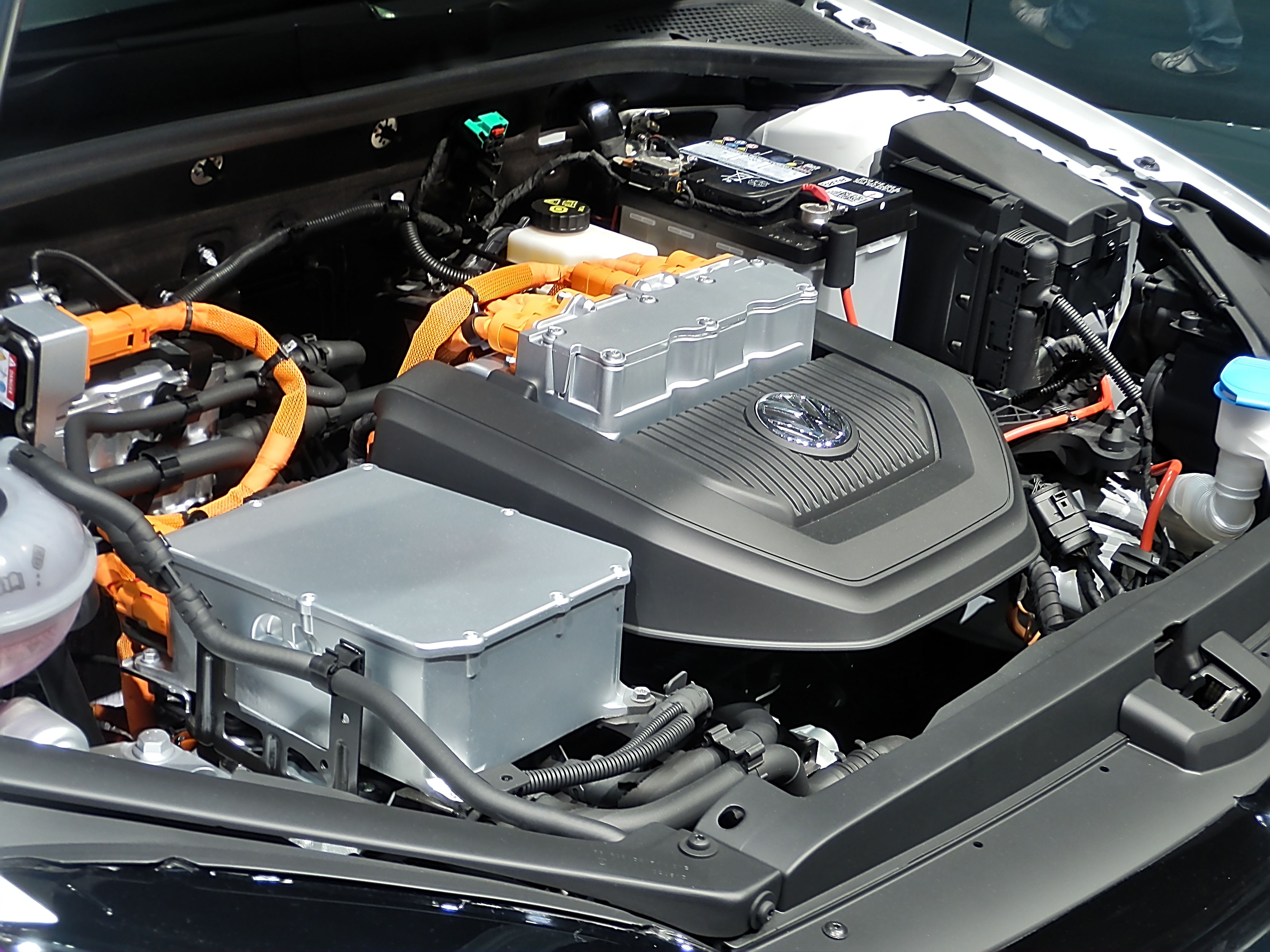 Volkswagen e-Golf VII at IAA 2013